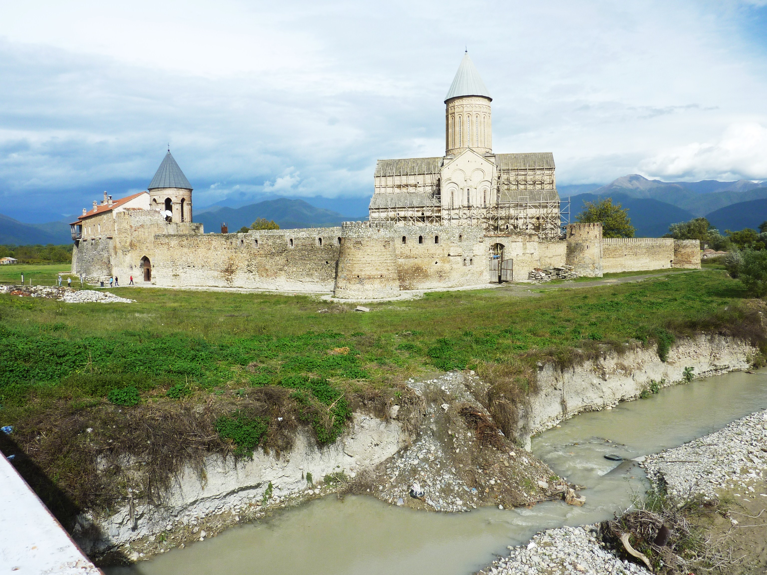 Cathédrale Saint-Georges d'Alaverdi (XIe siècle)